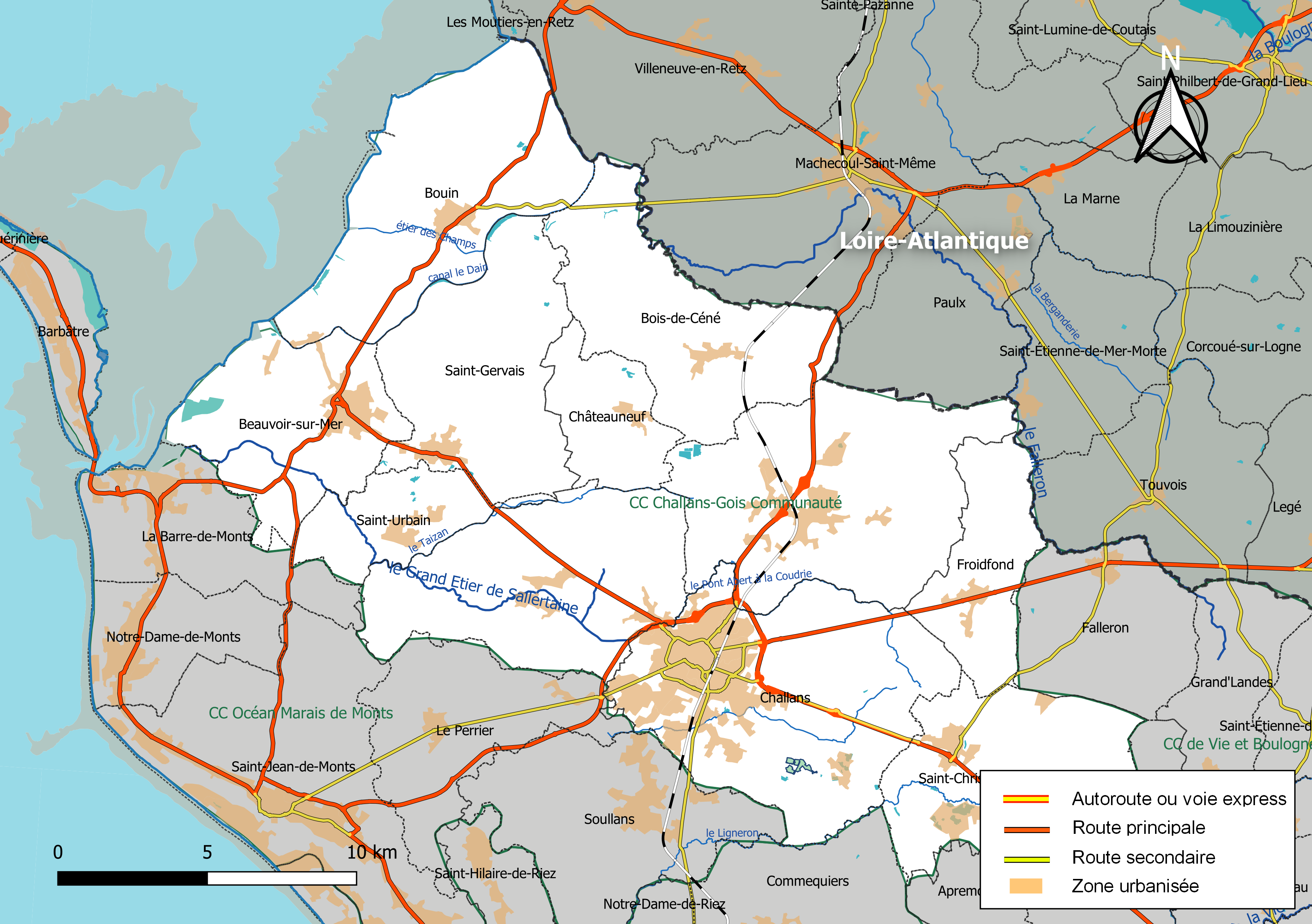 Carte géographique de la Communauté de communes Challans-Gois Communauté, département de la Vendée, France. Composition au 1er janvier 2019.